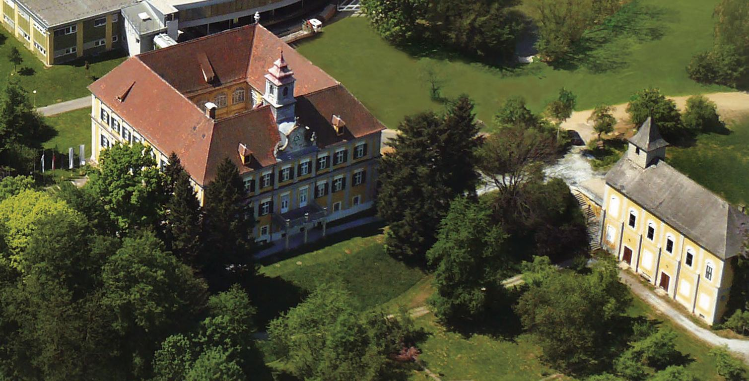 Schloss Unterpremstätten mit Schlosskapelle